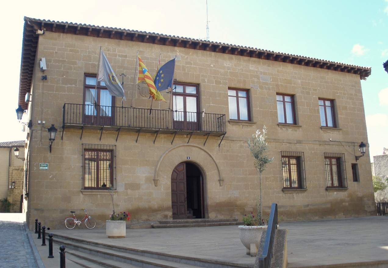 Ayuntamiento de Sádaba